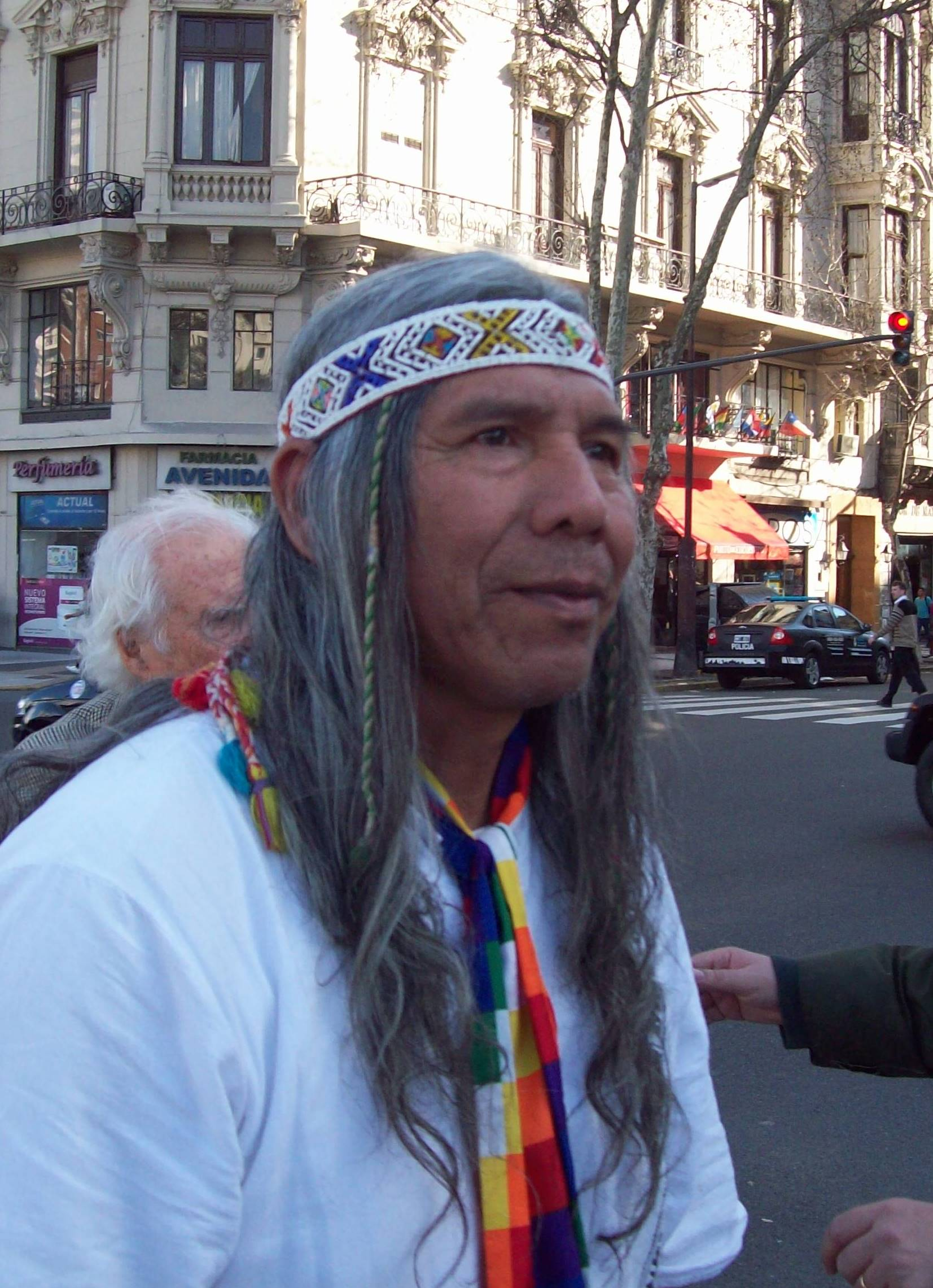 El qarashé Félix Díaz de los Qom en el acampe Qom en la Avenida 9 de Julio y Avenida de Mayo, en la ciudad autónoma de Buenos Aires.